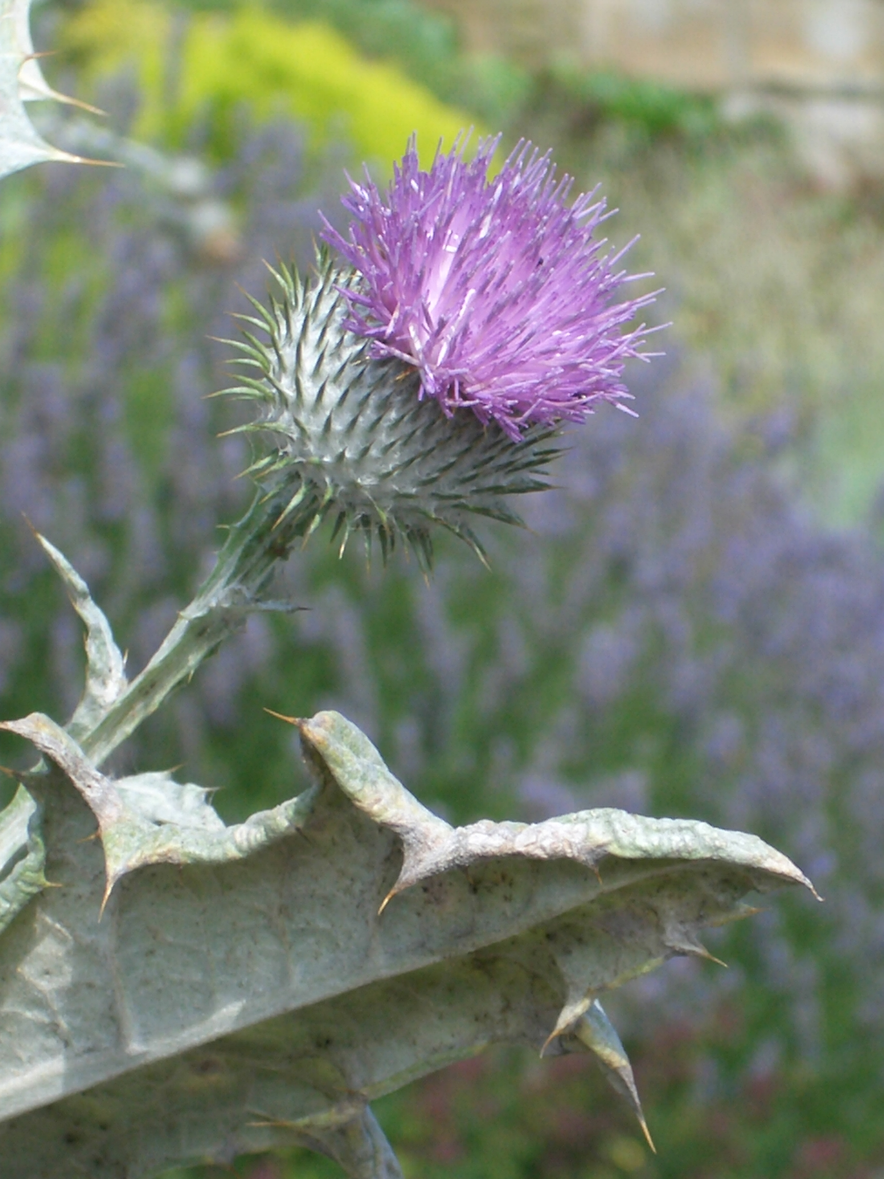 Onopordum acanthium - Eselsdistel